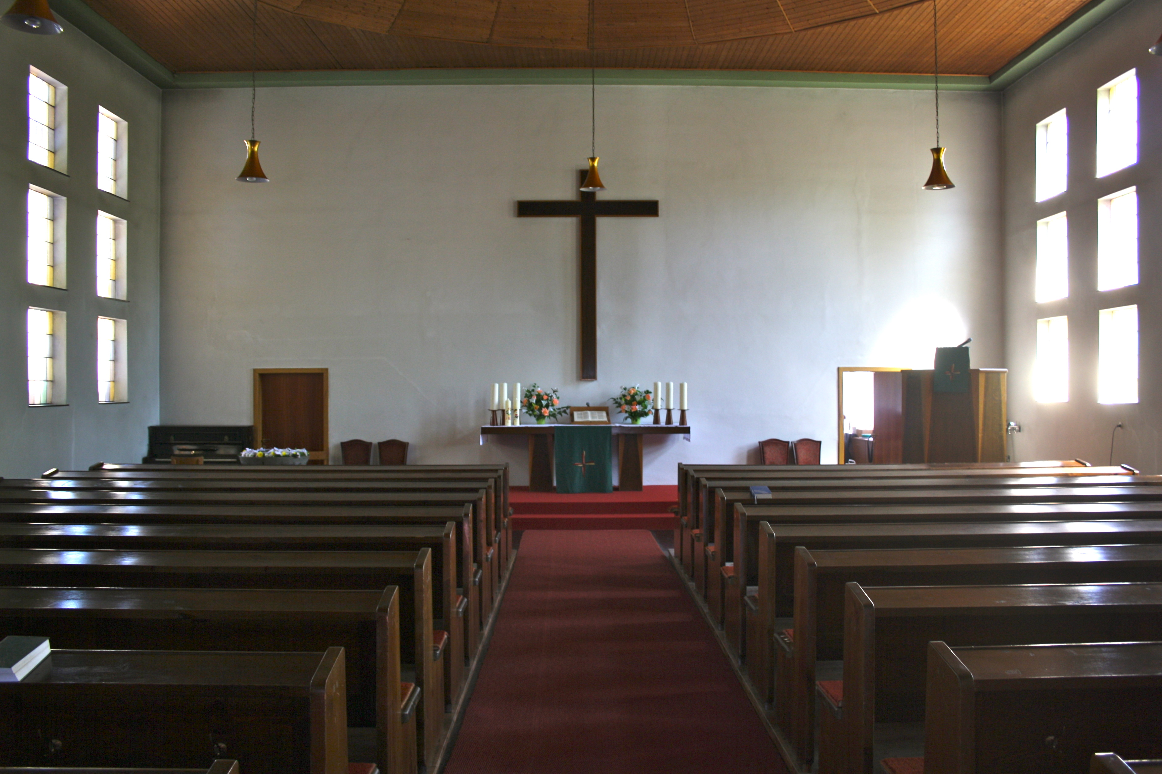 Evangelisch-lutherische Erlöserkirche in Wien-Leopoldau.